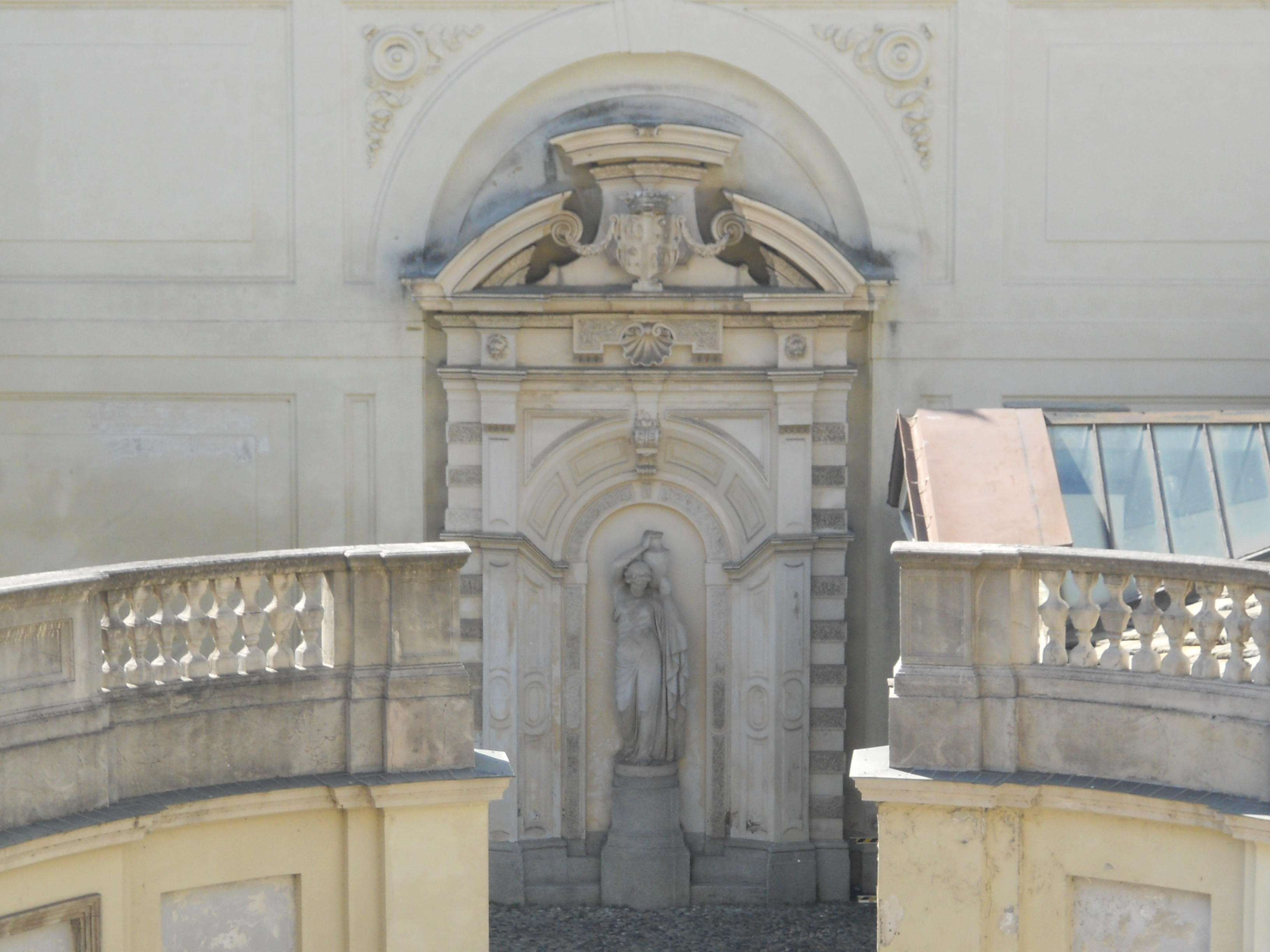 Cortile interno Palazzo Birago di Borgaro